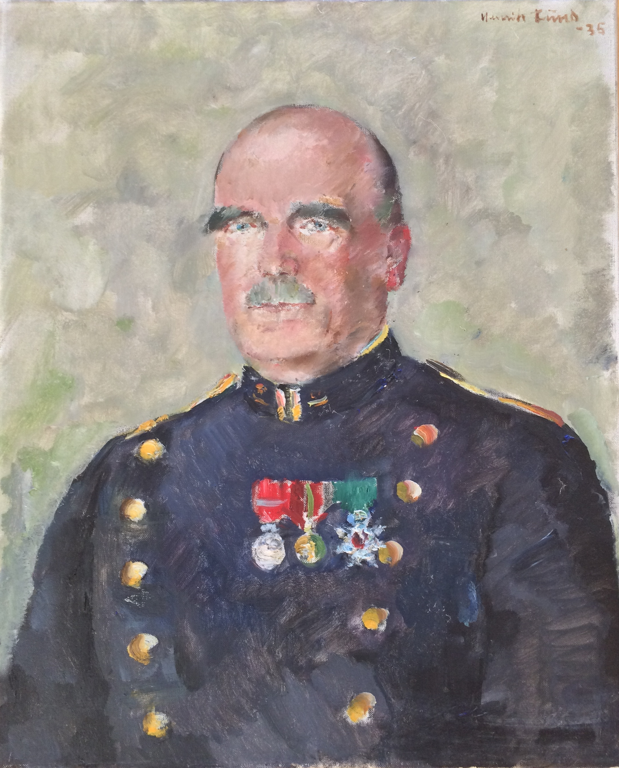 Portret by Henrik Lund